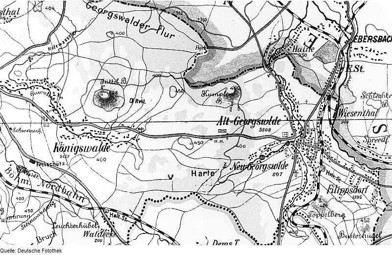 Original image description from the Deutsche Fotothek Jirikov (Georgswalde). Karte des politischen Bezirkes Schluckenau, aus: Heimatkunde Schluckenau, 1898